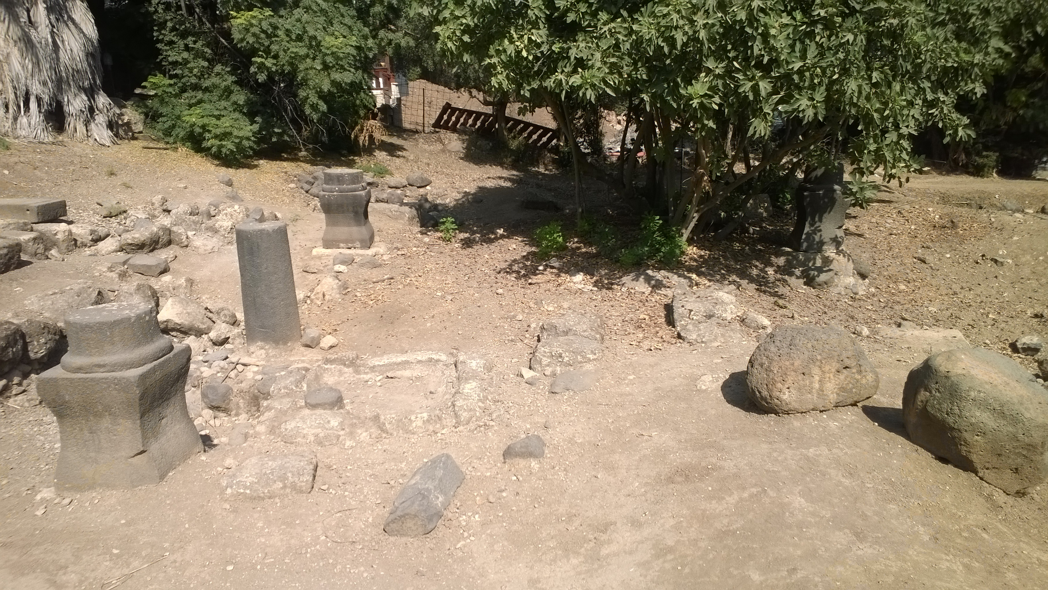 יסוד המעלה נוסדה בשנת 1883 של שפתו הדרום-מערבית של אגם החולה והייתה מן המושבות הראשונות שהוקמו על ידי אנשי העלייה הראשונה, והמושבה השנייה שהוקמה בגליל העליון לאחר ראש פינה.